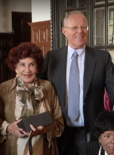 Mariella Trejos al lado del Presidente Constitucional de la República del Peruana.